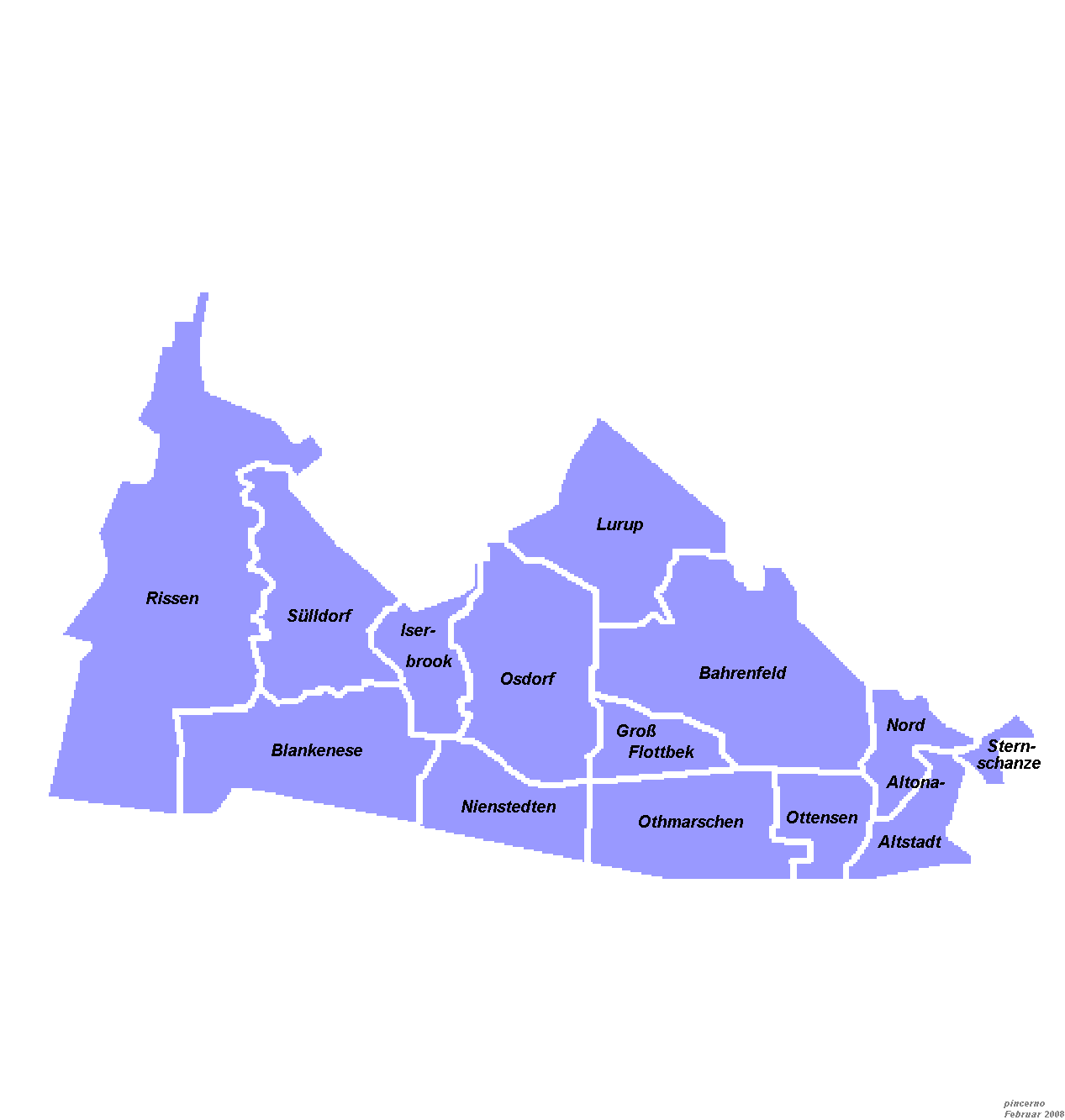 Stadtteile im Bezirk Altona in Hamburg.